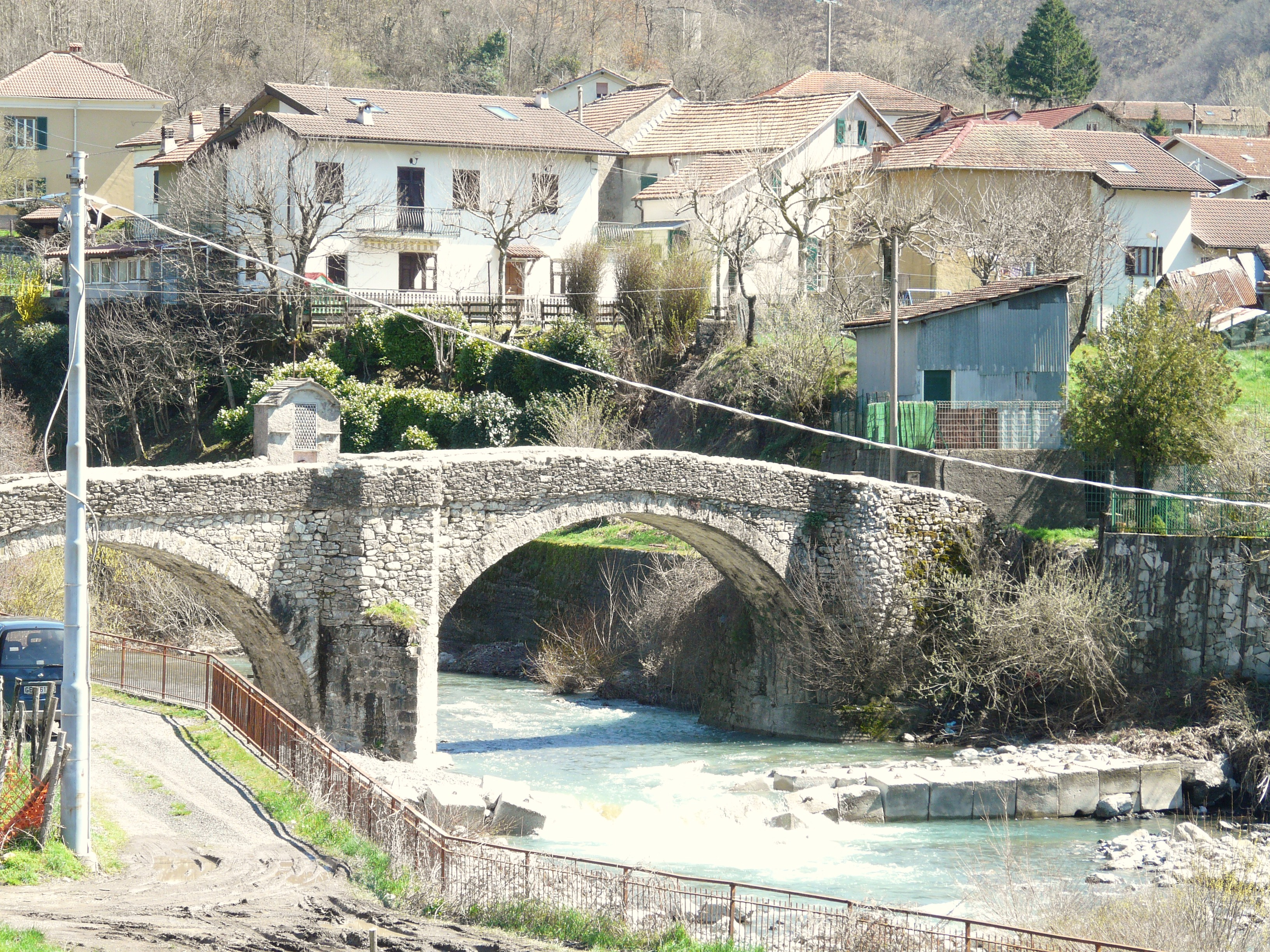 Ponte sui torrenti Pentemina e Laccio, Montoggio, Liguria, Italia